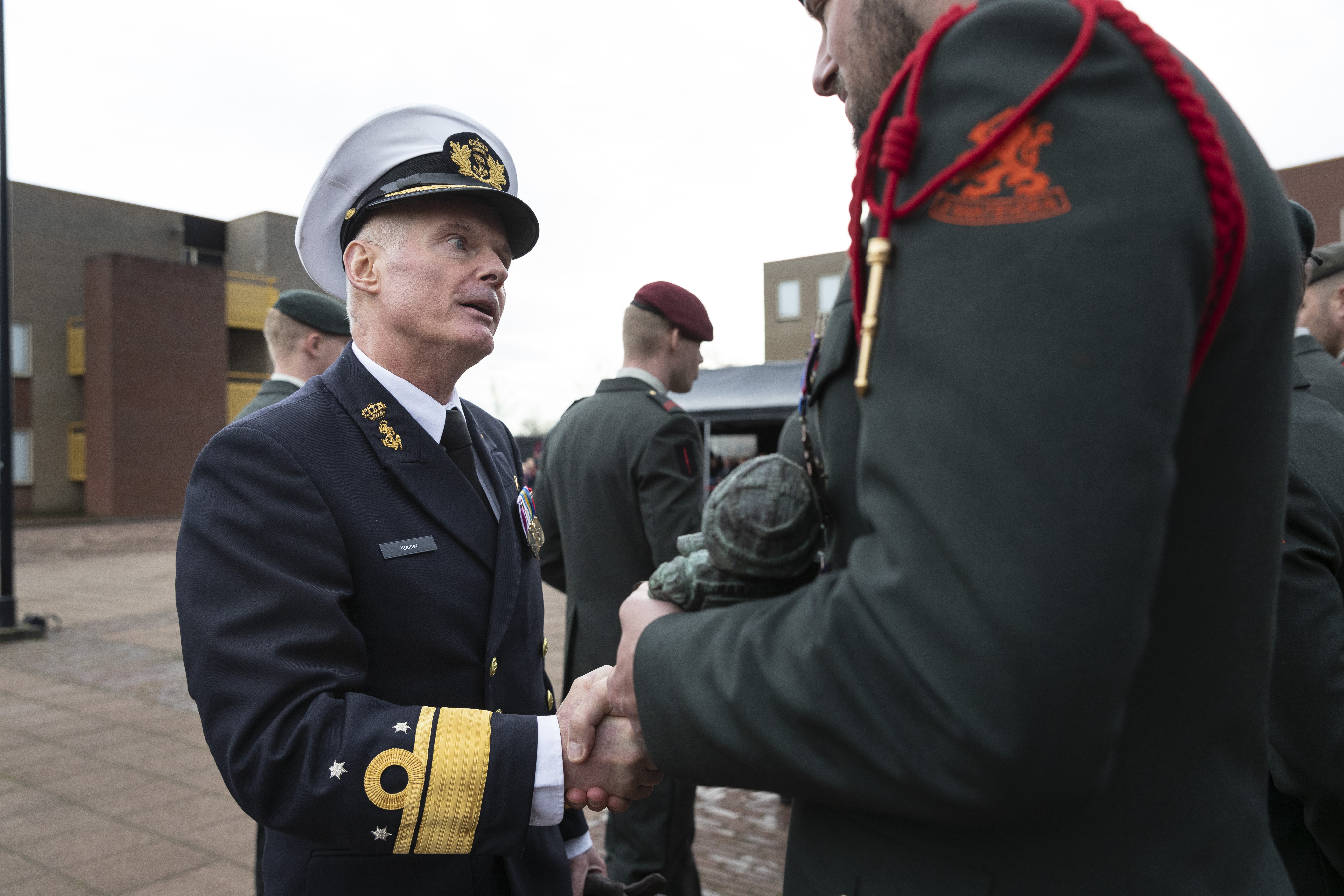 Roosendaal, 19 December 2019 23 Militairen krijgen een ereteken van verdiensten in de vorm van een medaille waarbij een aantal ook nog een bronzen soldaat krijgen.